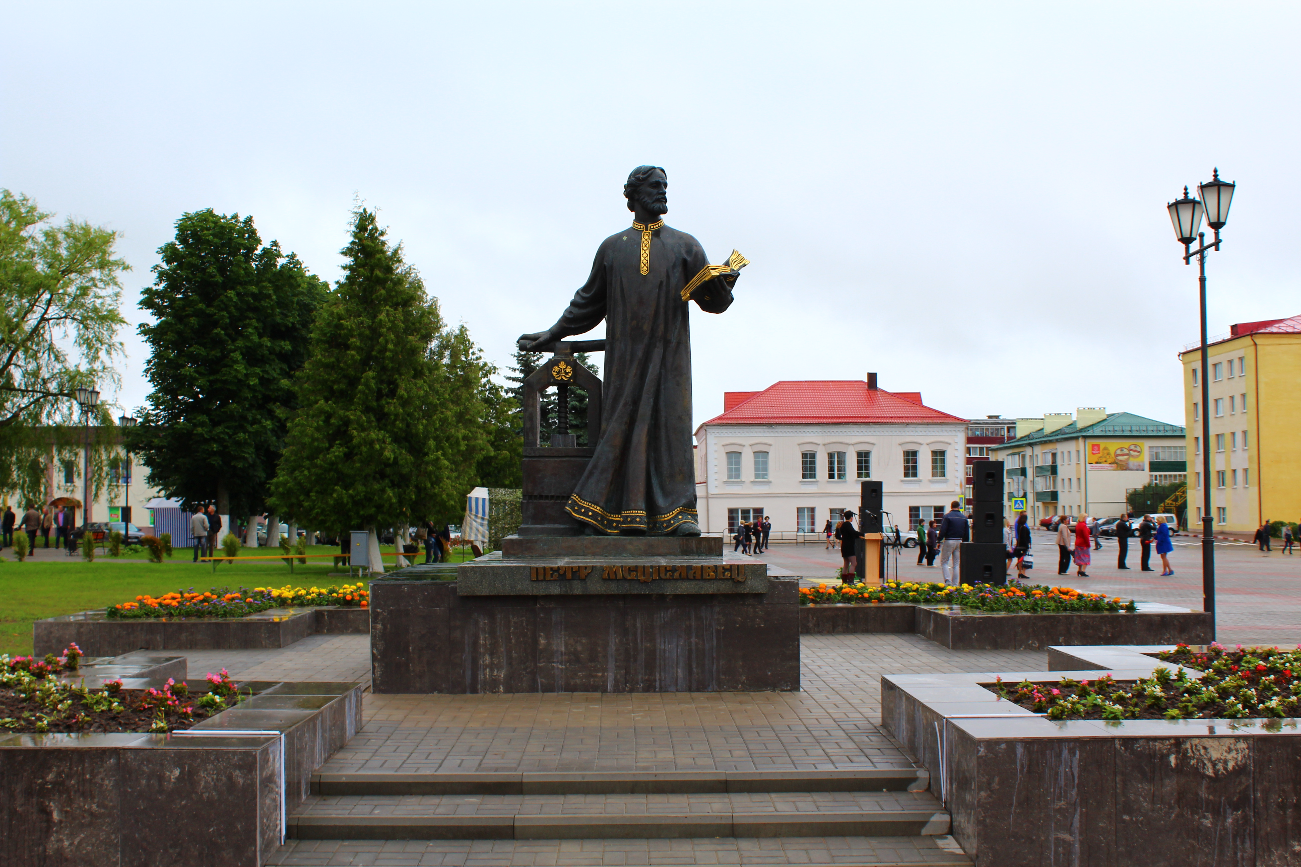 Мсціслаў. Краявіды